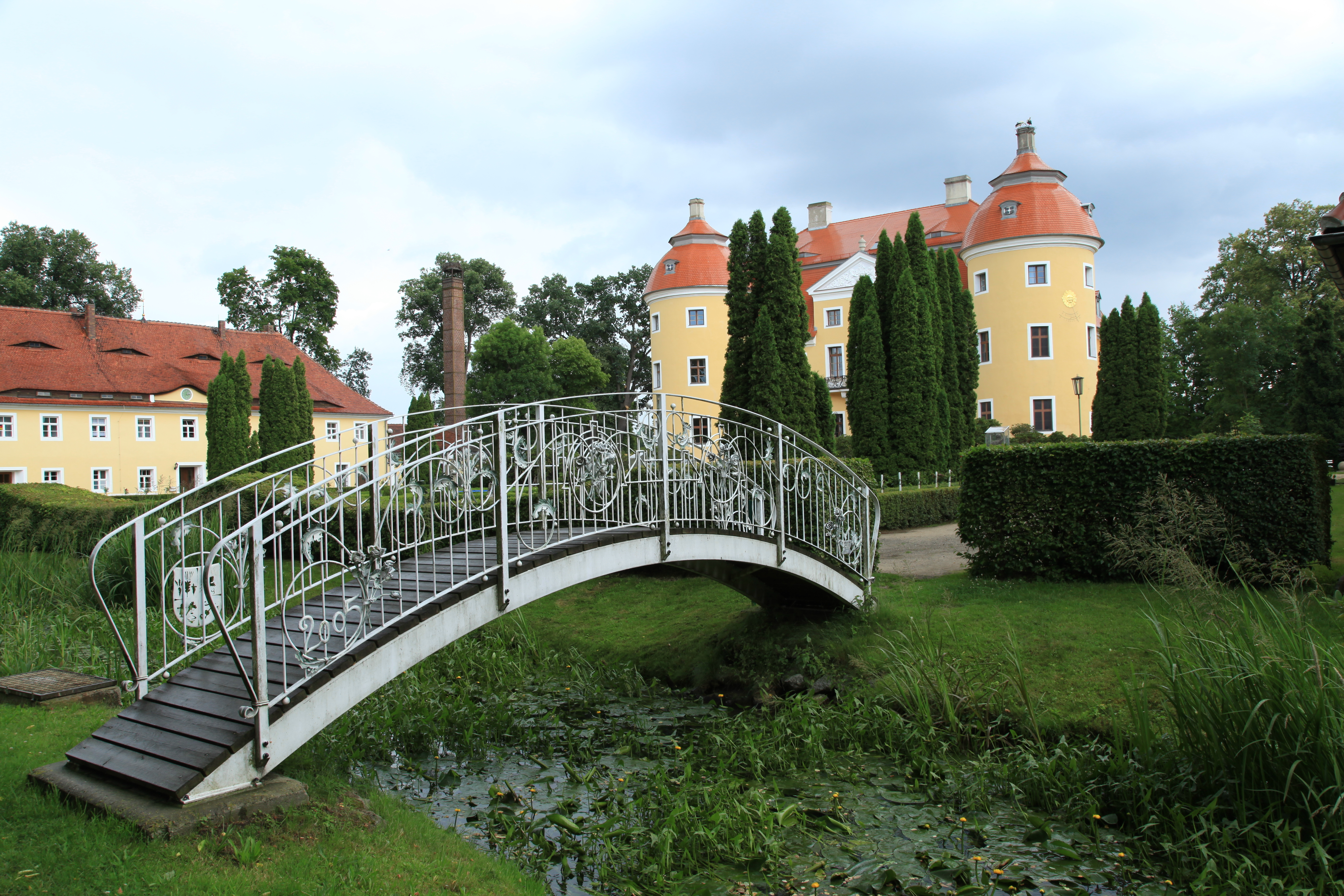 Schmiedeeisenbrücke im Schlosspark am Schloss Milkel in Milkel, Radibor Hornjoserbsce: Mosćik z kowaneho železa w Minakałskim hrodowym parku.